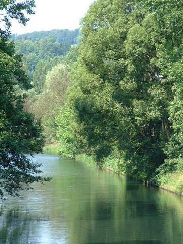 D'Uelzecht bei Ettelbréck (2003).